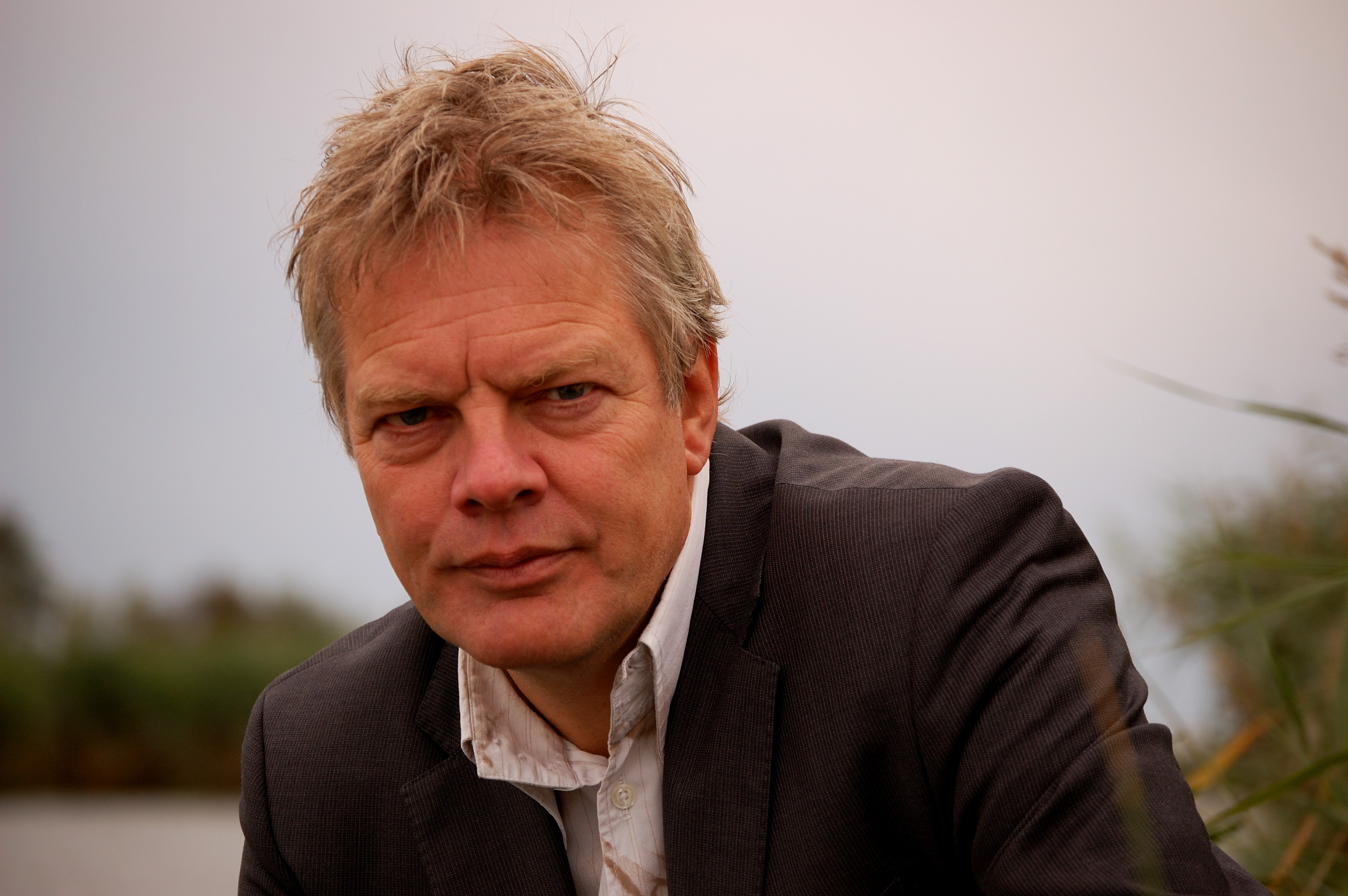 Kees Wieringa